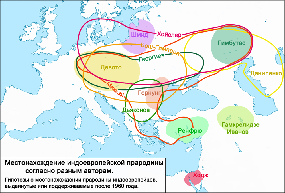 Карта, отражающая гипотезы разных авторов о прародине индоевропейцев, выдвинутые или поддерживаемые с 1960 года. Источник: Mallory J. P. In Search of the Indo-Europeans. — Thames and Hudson, 1991. — P. 144